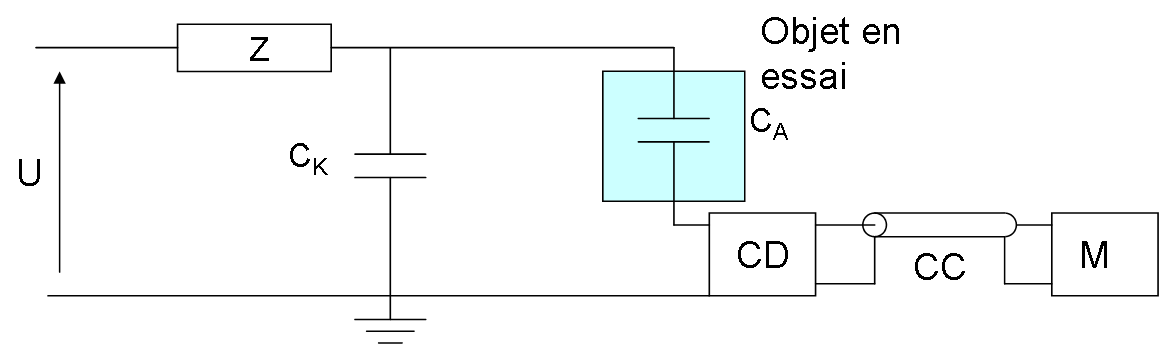 Montage 1b pour la mesure de décharges partielles d'après norme CEI